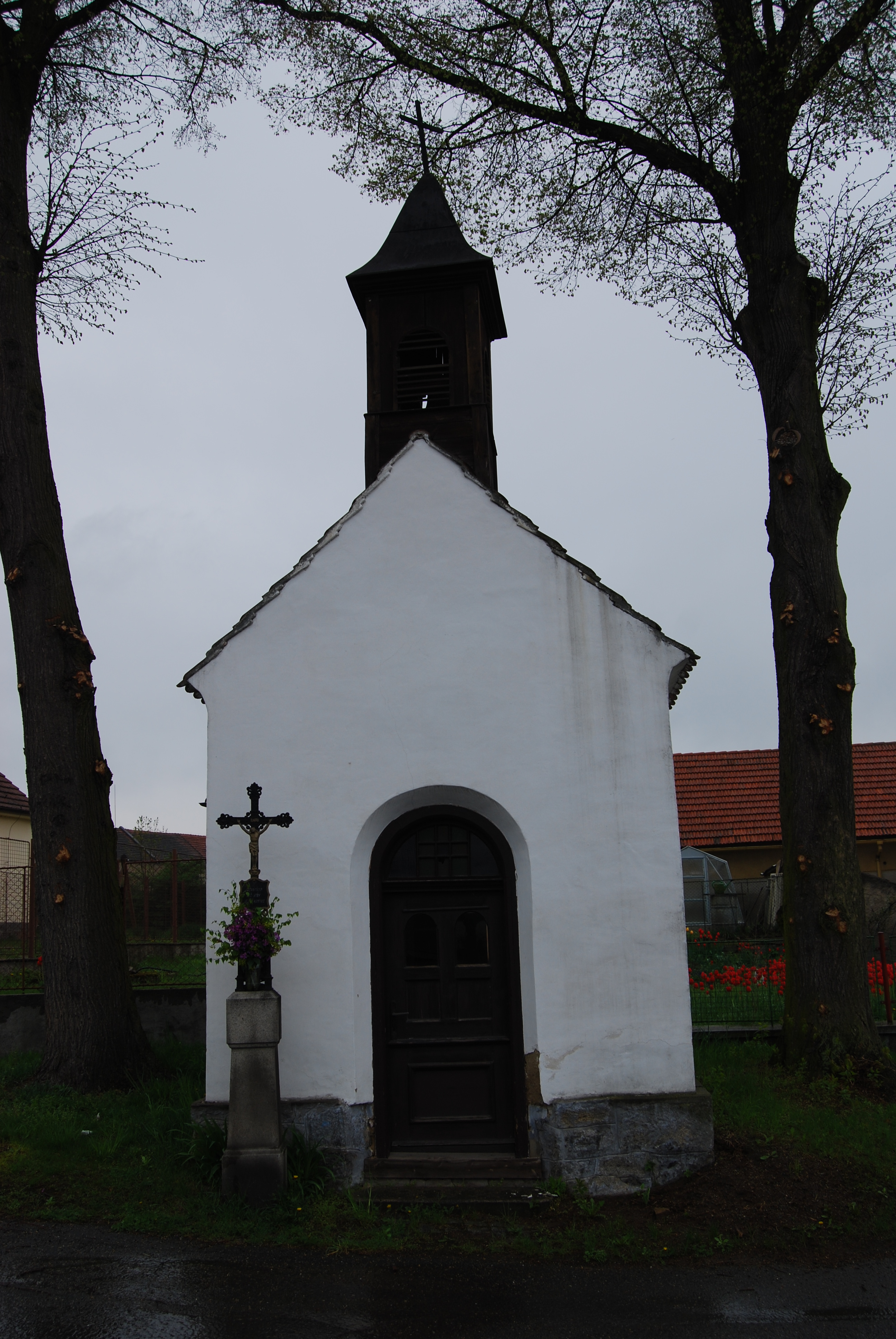 Kaple a kříž v obci. Obec Nečín se nachází v okrese Příbram, kraj Středočeský. Česká republika.